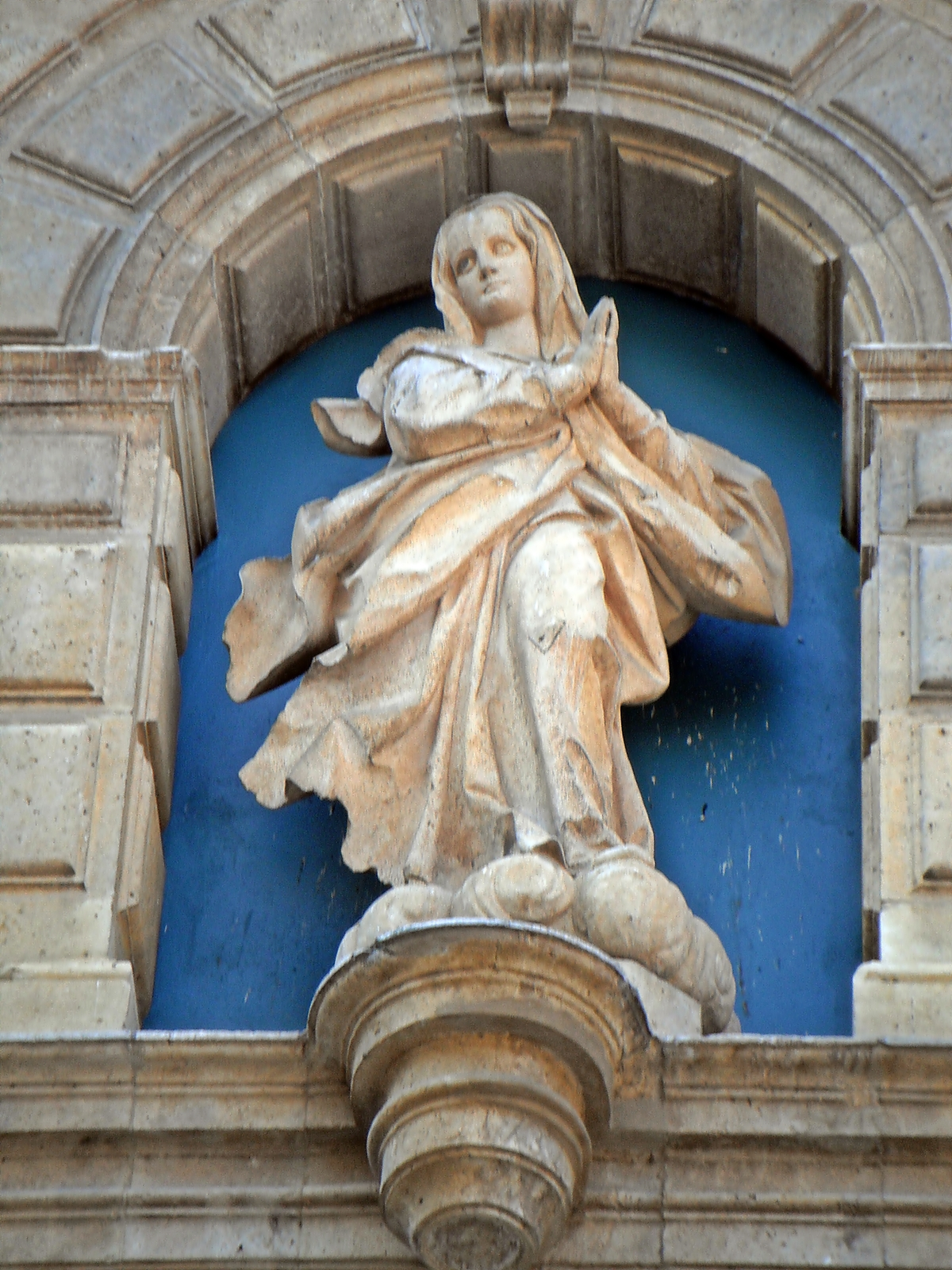 Convento de las Comendadoras de Santa Cruz en Valladolid